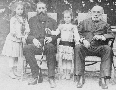 Daniel Wilson, deux de ses filles et son beau-père Jules Grévy (à droite) en 1889.